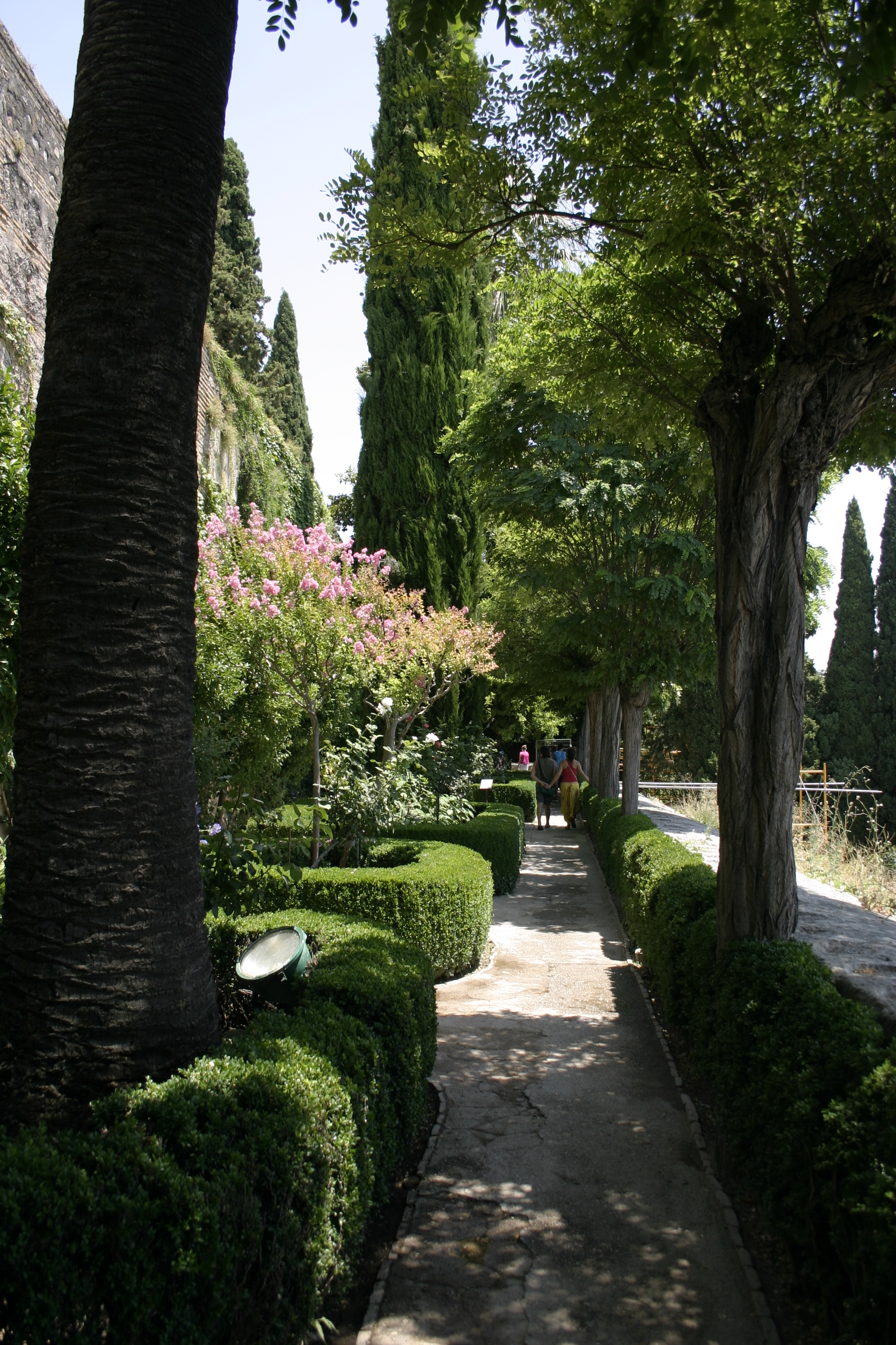 Alhambra, Granada, Spanyolország (parkrészlet)